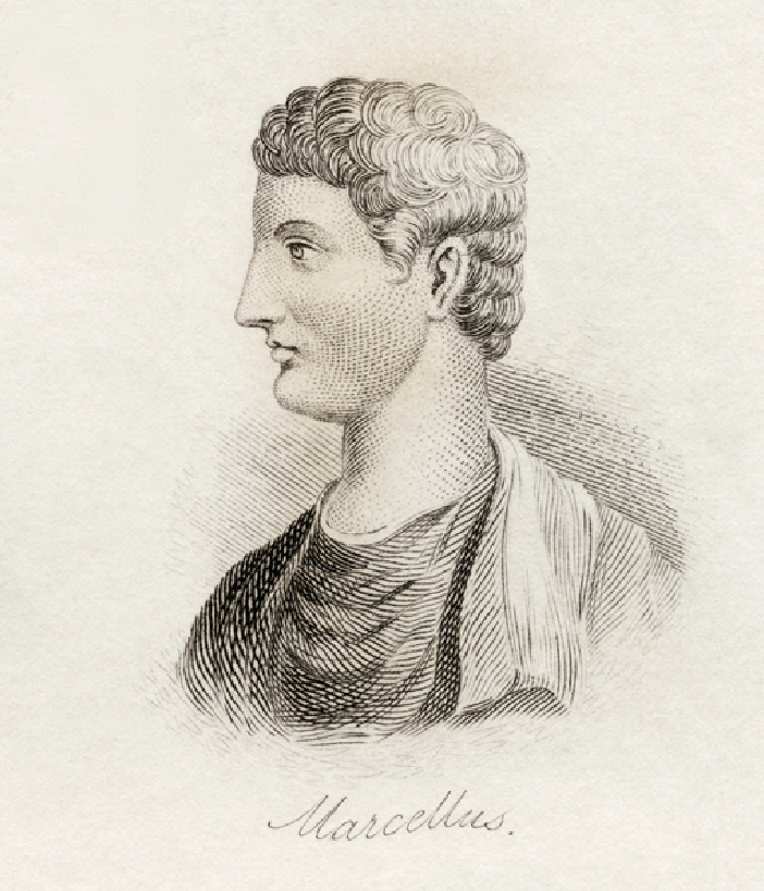 Marco Claudio Marcello